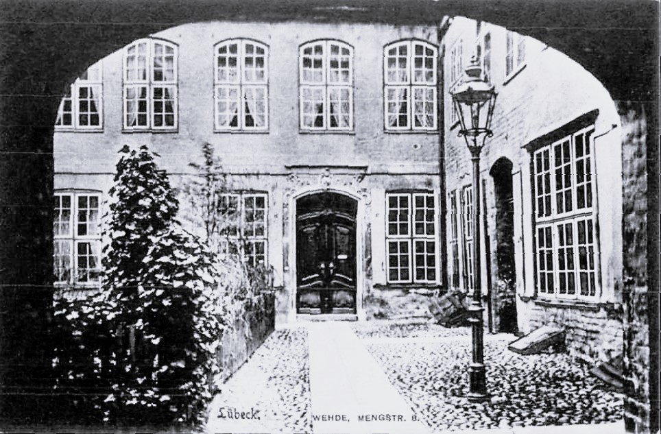 Lübeck, Wehde, Mengstraße 8